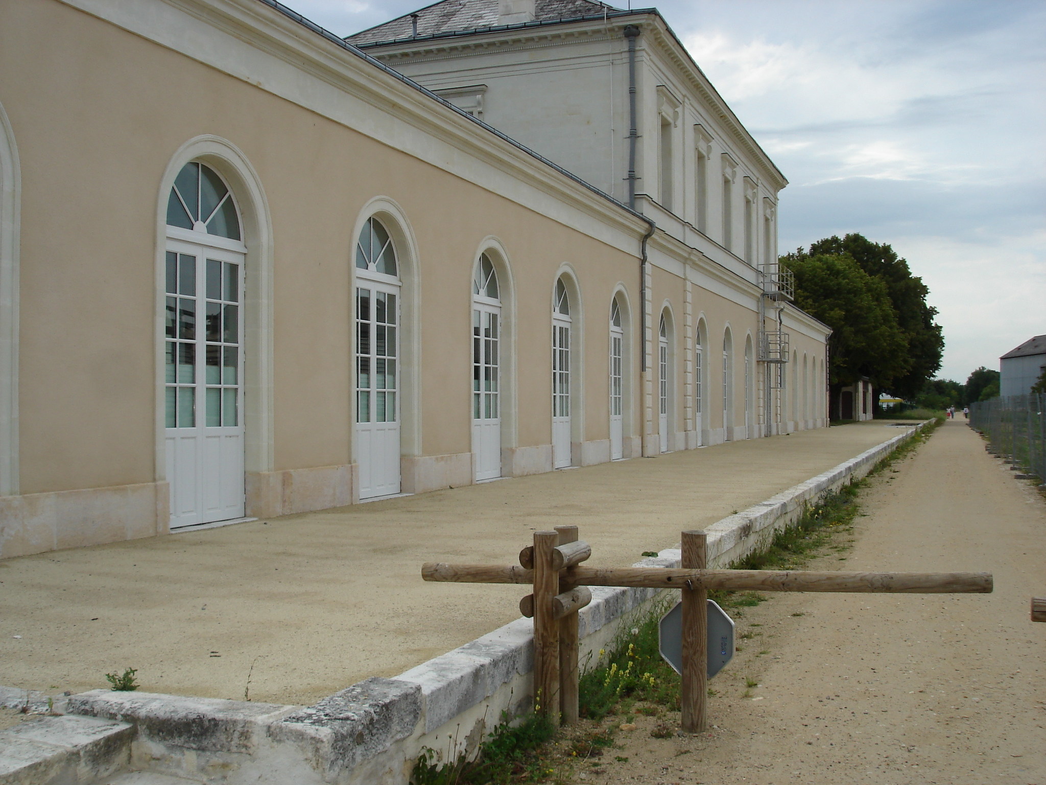 Gare du Blanc (36) : L'ancien quai latéral et bâtiment voyageurs. L'ancienne voie est aujourd'hui une voie verte.